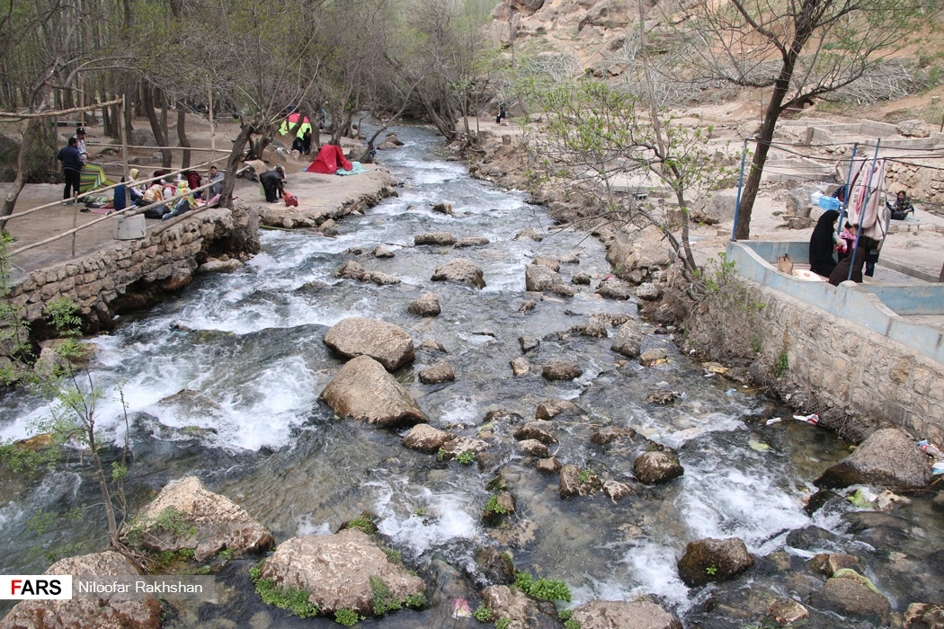 پیرغار یپیرغار مکانی دیدنی در روستای ده‌چشمه شهرستان فارسان استان چهارمحال و بختیاری است که تا مرکز استان کمتر از ۳۰ کیلومتر فاصله دارد؛ رودخانه‌ای بسیار زیبا، غارهایی سحرآمیز و کتیبه‌هایی تاریخی از جمله جاذبه‌های گردشگری پیرغار است.